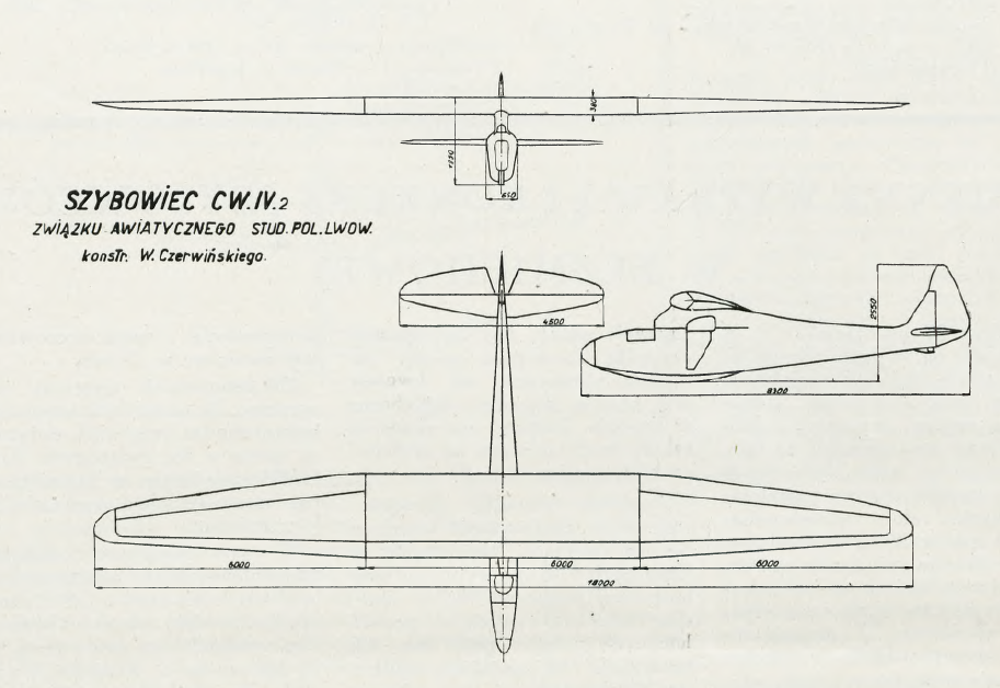 Rzuty szybowca CW-IV konstrukcji Wacława Czerwińskiego